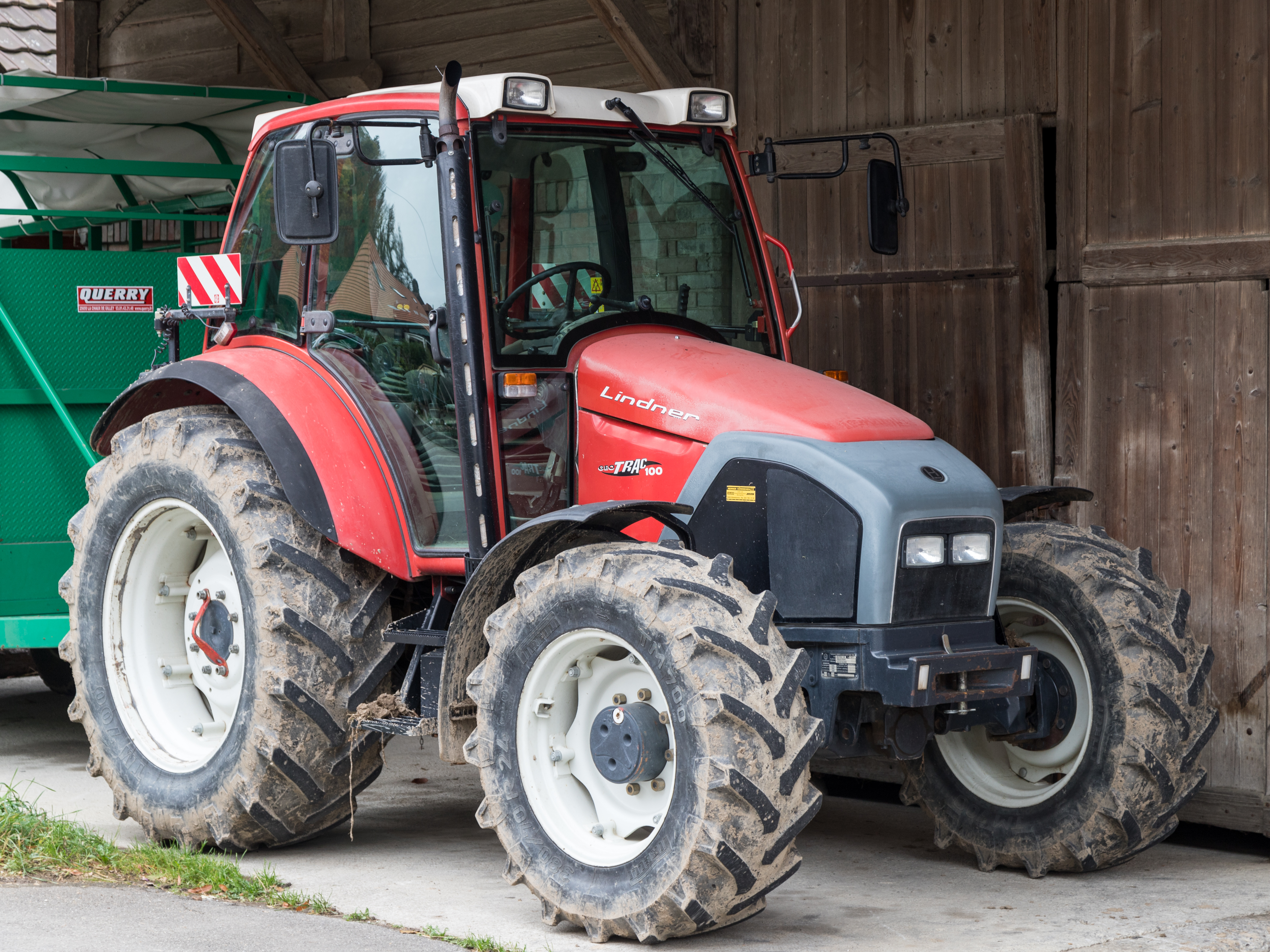 Lindner GeoTrac 100